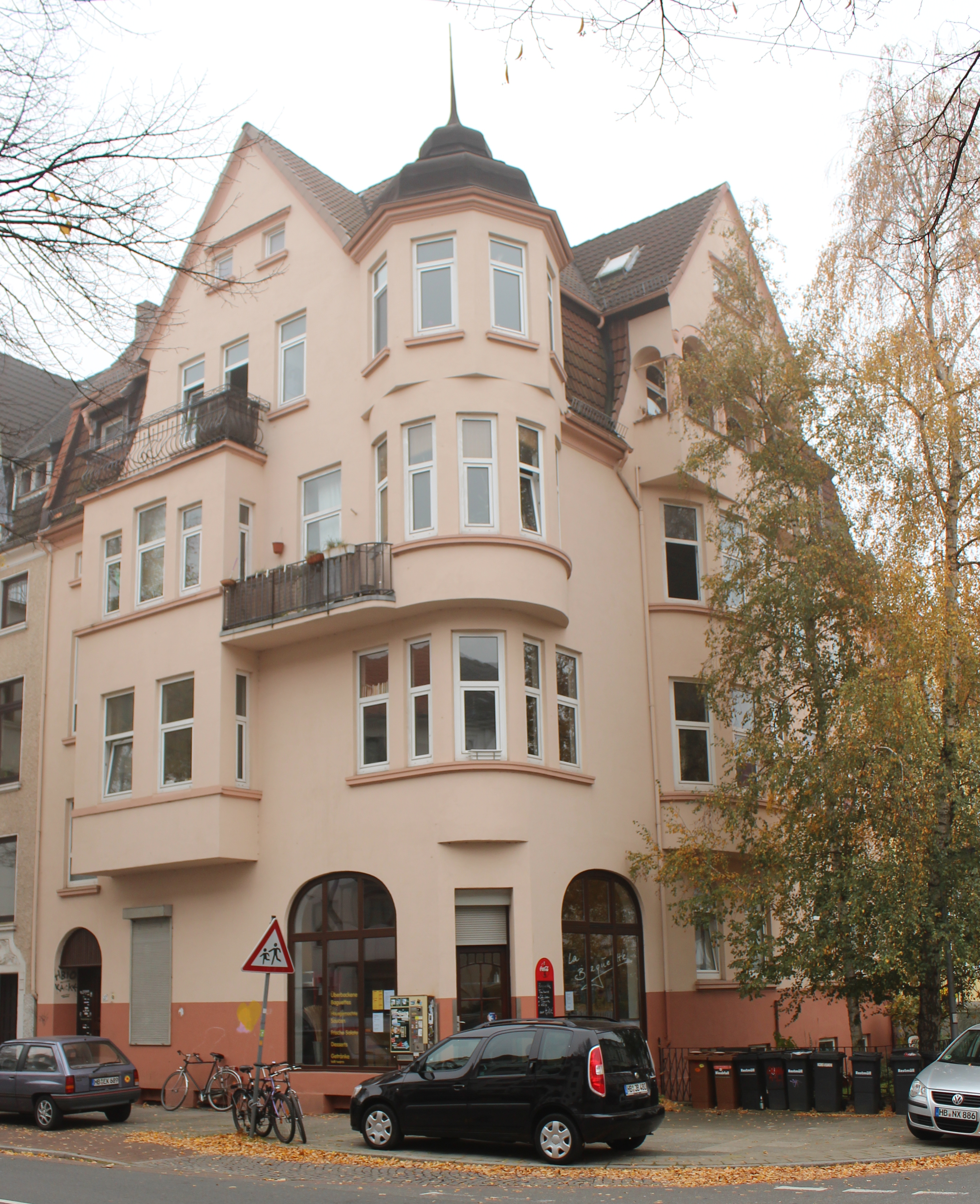 Mietshaus in Bremen, Lahnstraße 27. Das abgebildete Objekt ist ein geschütztes Kulturdenkmal in der Freien Hansestadt Bremen, mit der Nr. 0824 beim Landesamt für Denkmalpflege registriert.